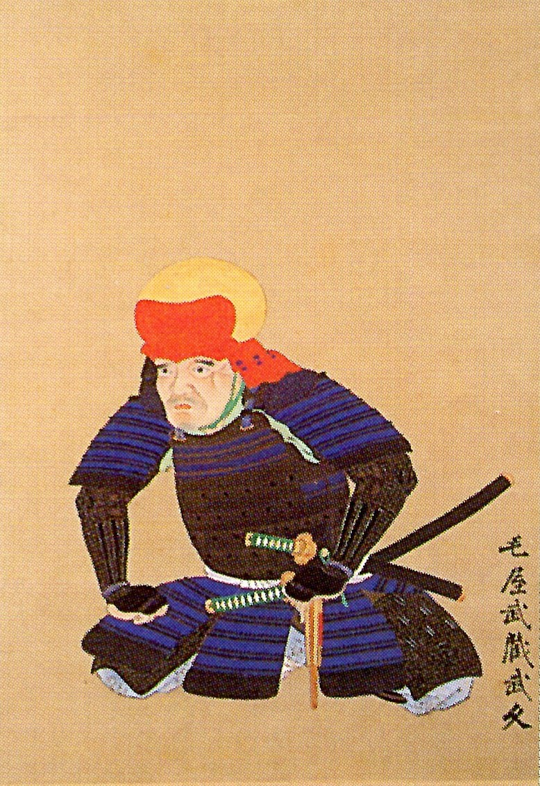 毛屋武久の肖像。